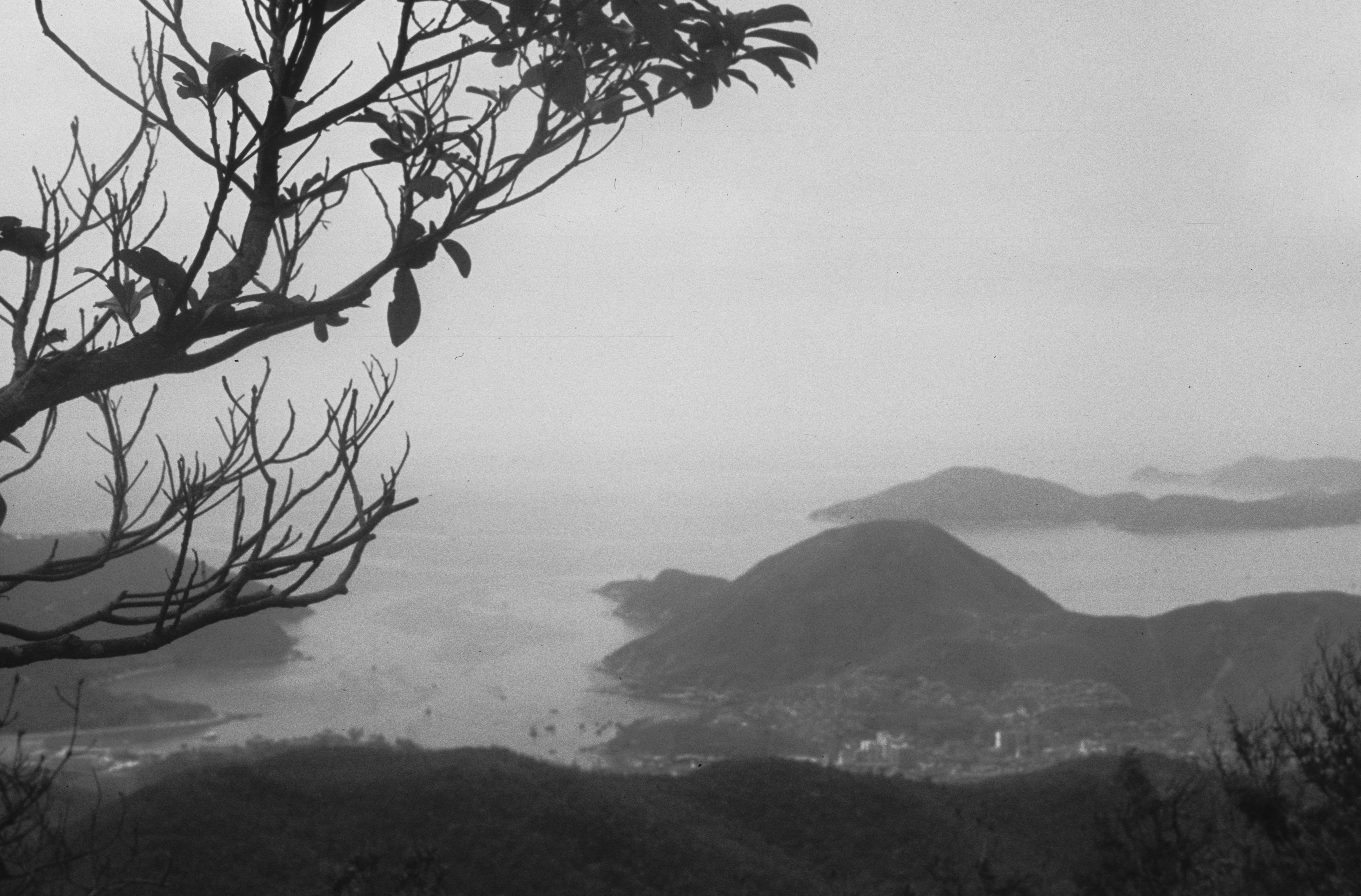 Hong Kong